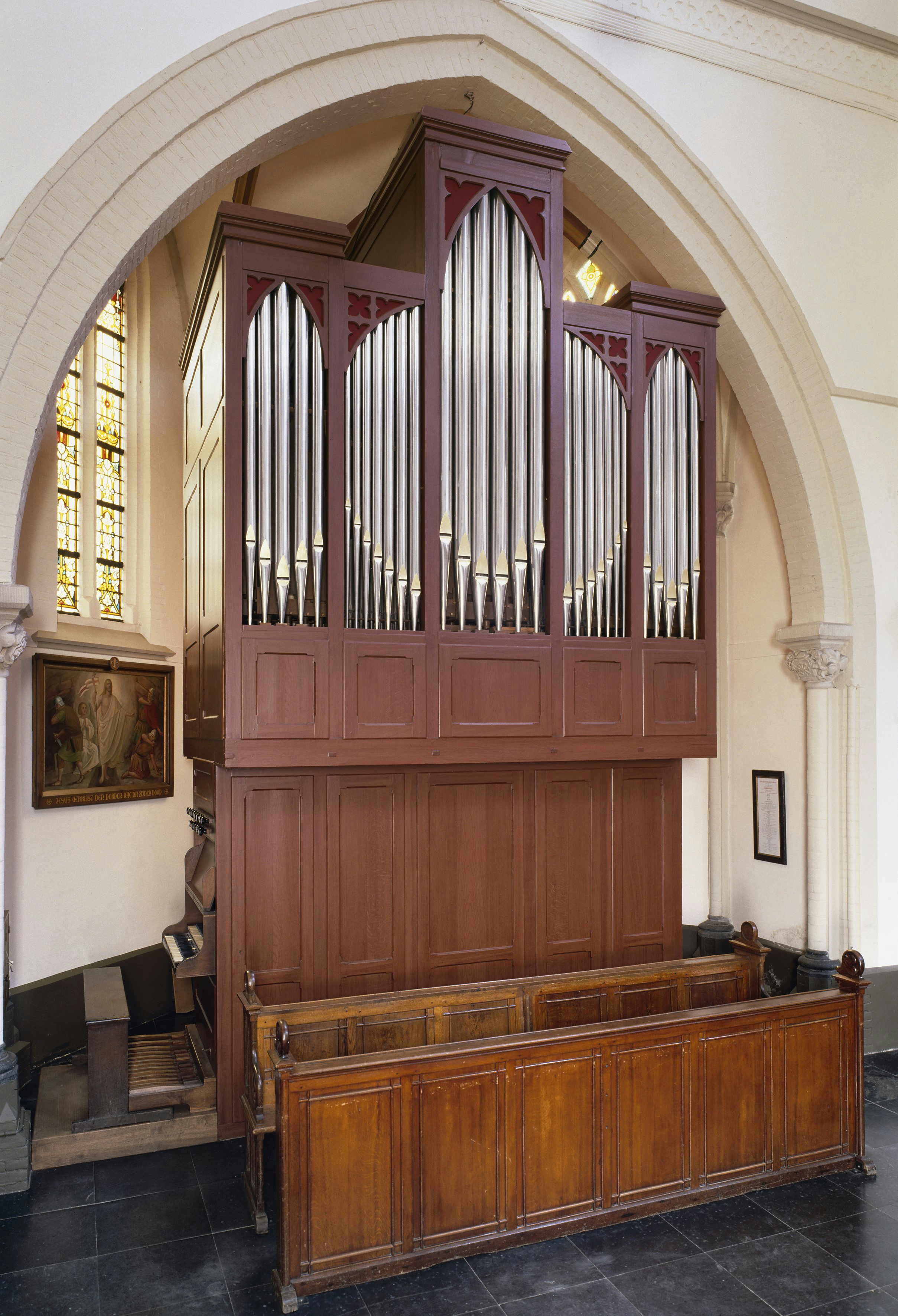 Sint Willibrorduskerk: Intenieur, aanzicht orgel, orgelnummer 646 (opmerking: Gefotografeerd voor Het Historische Orgel in Nederland 1872-1878, bladzijde 274)